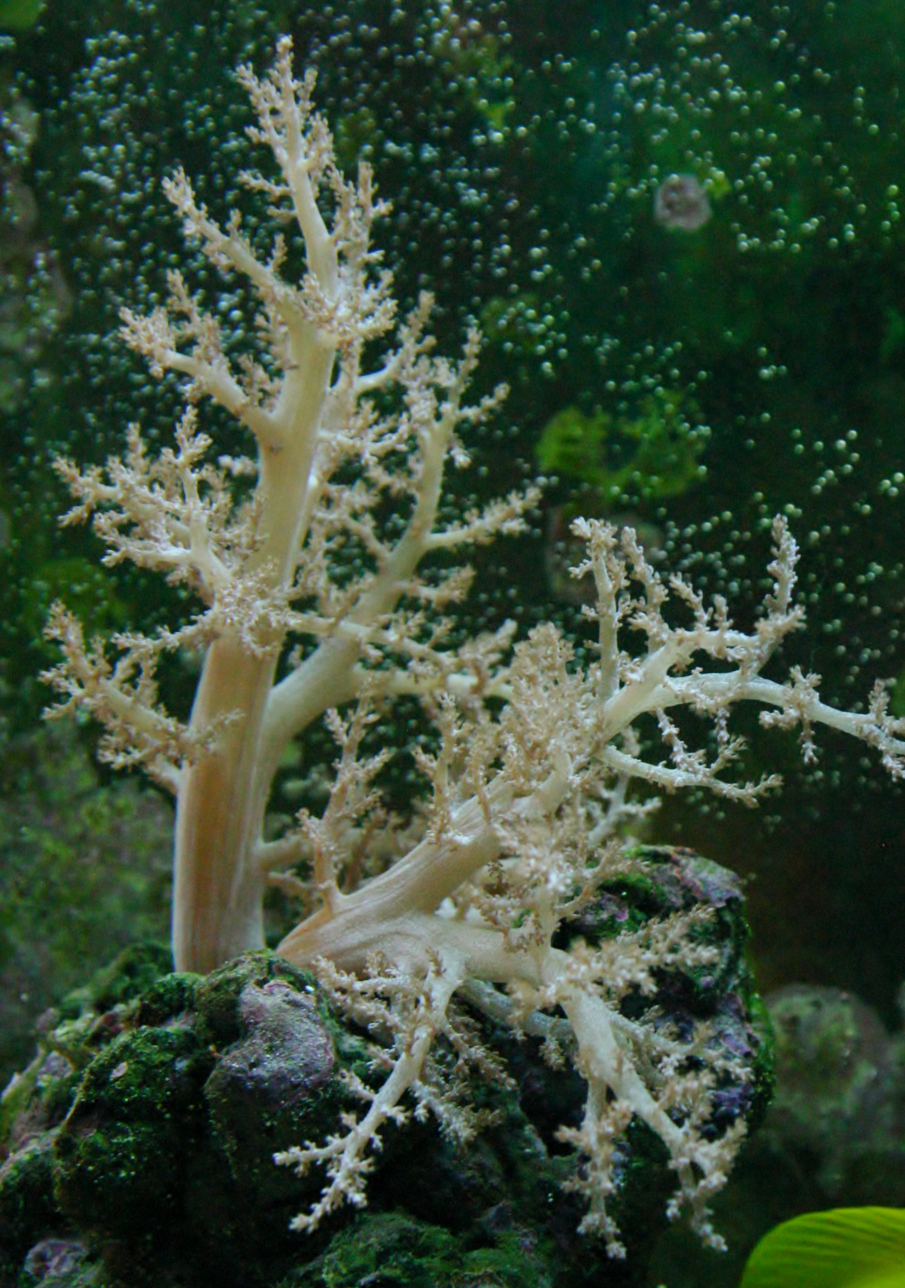 Capnella en acuario de arrecife